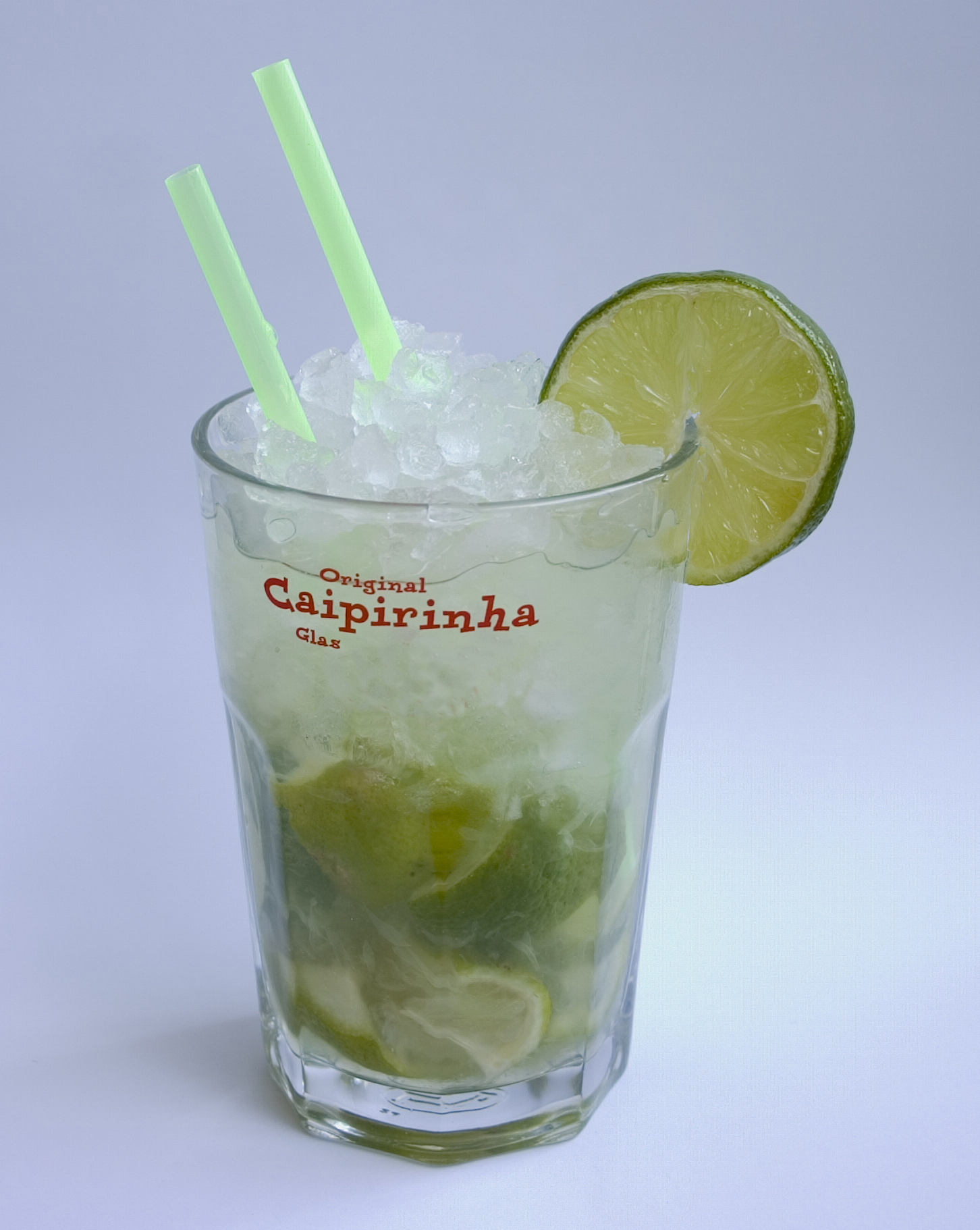 Cocktail Caipirihna a la Wikipedia